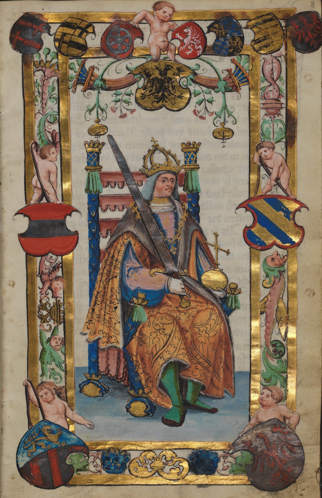 Weingartener Stifterbüchlein, Württembergische Landesbibliothek Stuttgart, Cod.hist.qt.584, fol. 8r, Widmungsblatt Kaiser Maximilian I. unter den Wappenschilden der sieben Kurfürsten und dem Reichsadler, weiter unten Wappen von Österreich (nachgedunkeltes Silber!), Burgund, Görz und Tirol